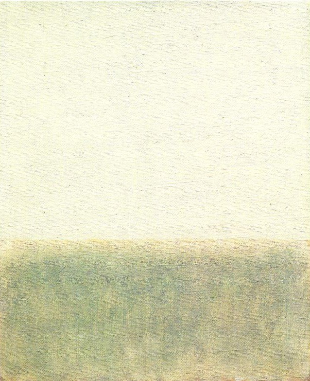 Piet Moget oeuvre 1998